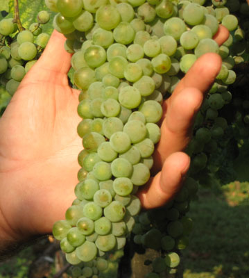 Juhfark Szőlő (Somlóhegy, Ragalya dűlő)